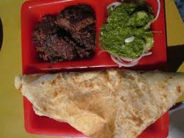 Tundey Kababi Thali